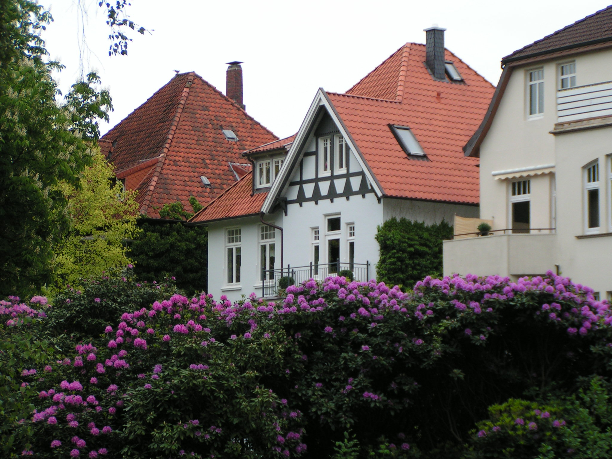 Häsuer an der Elisabethstraße im Gerichtsviertel an der Mühlenhunte in Oldenburg